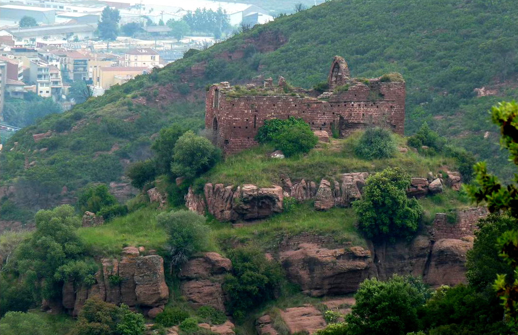 El conjunt des de migdia